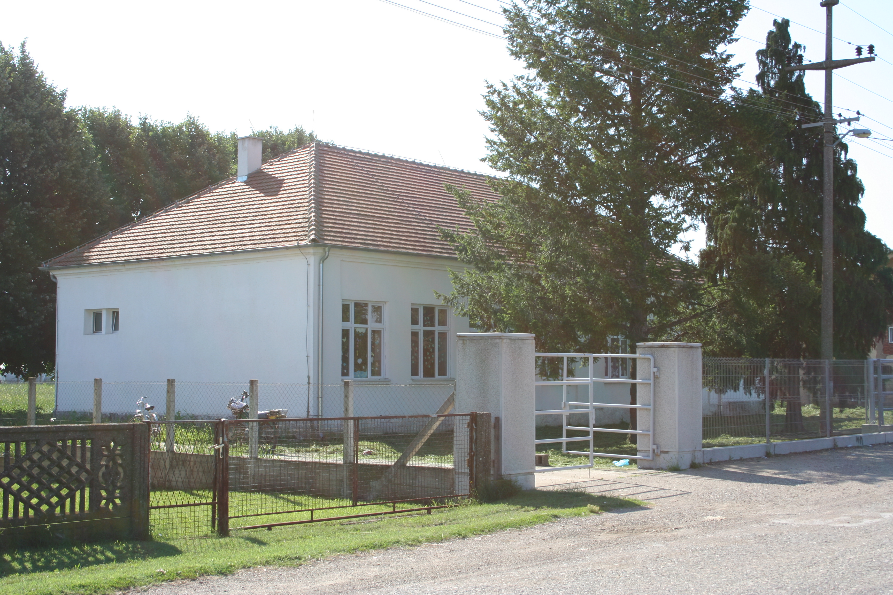 Zgrada škole, Mrđenovac